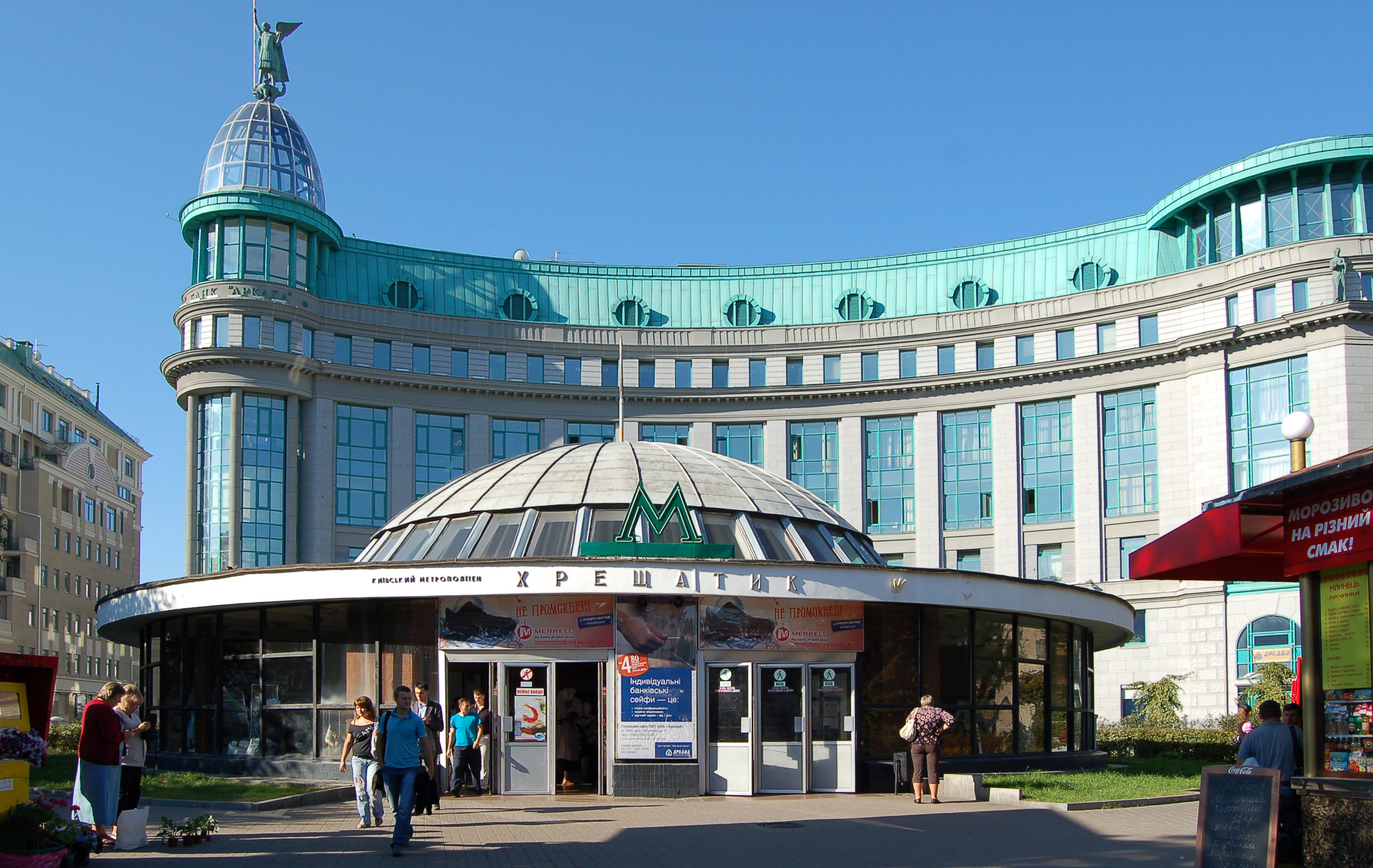 Станция метро «Крещатик», вестибюль на Институтской улице